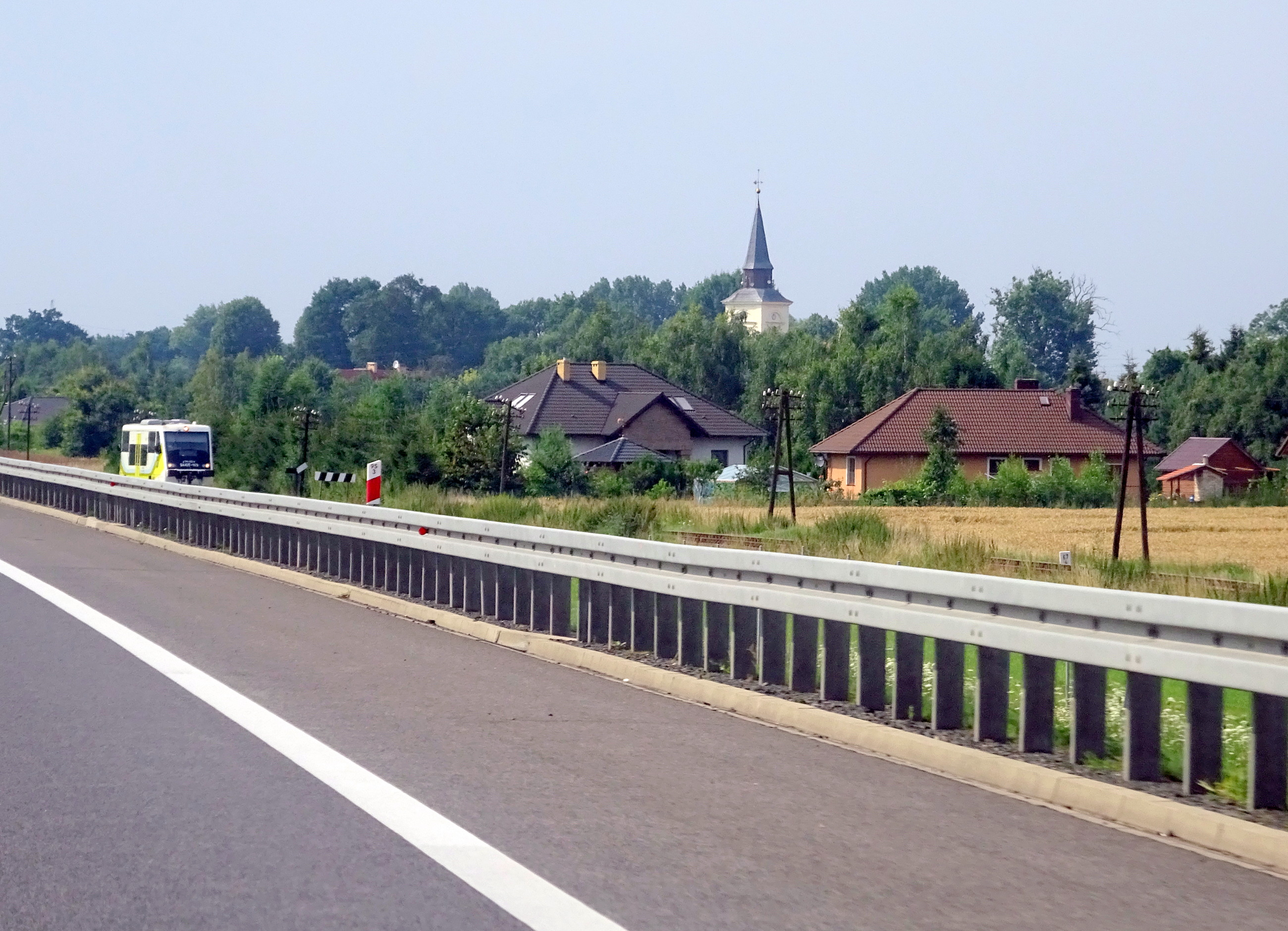 Karnin, południowa dzielnica Gorzowa Wlkp. Widok z drogi ekspresowej S-3. Widoczny szynobus na linii kolejowej nr 367